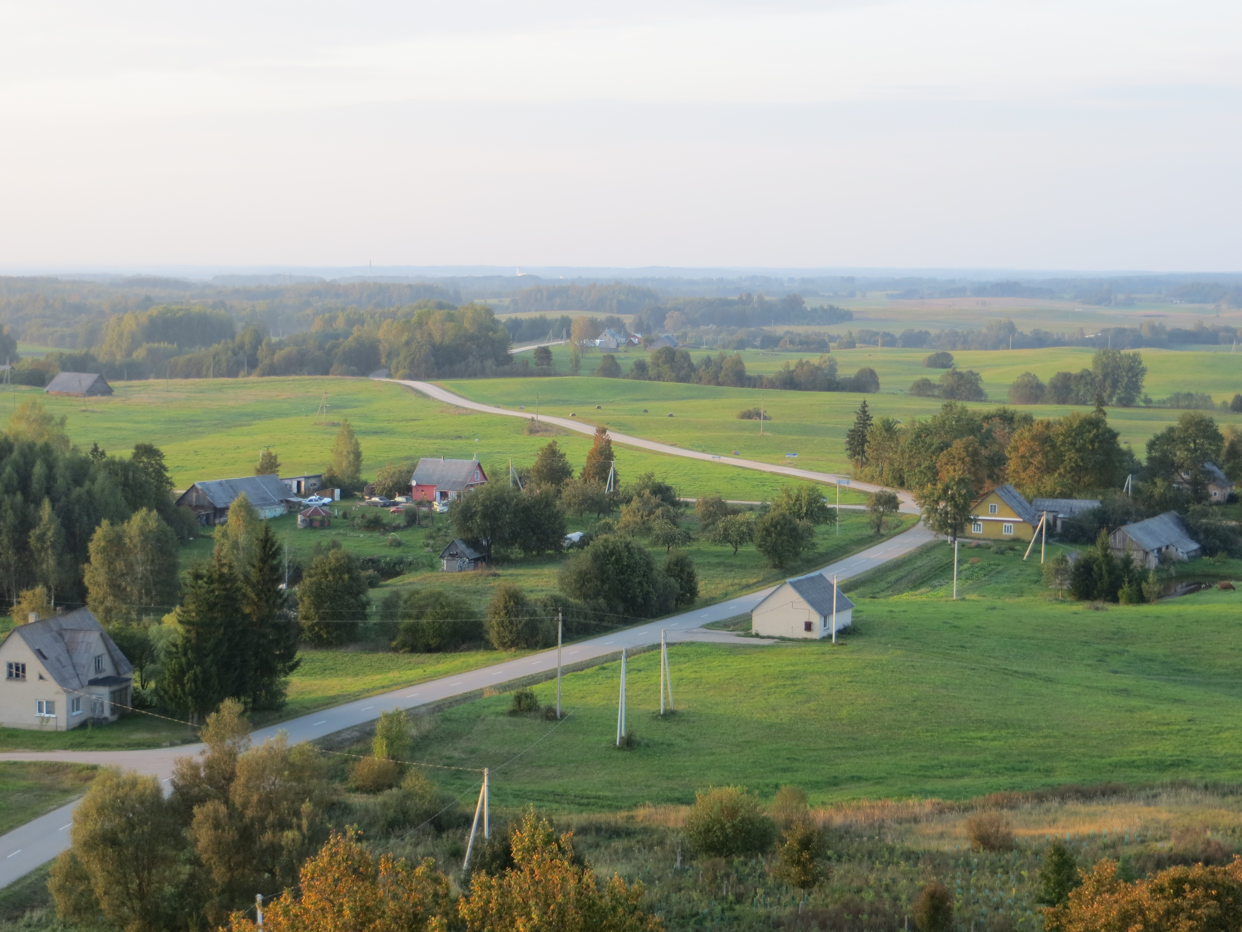 Raudoniškis, Lithuania